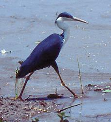 Héron pie (Ardea picata)